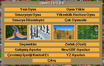 OpenTTD Türkce menü